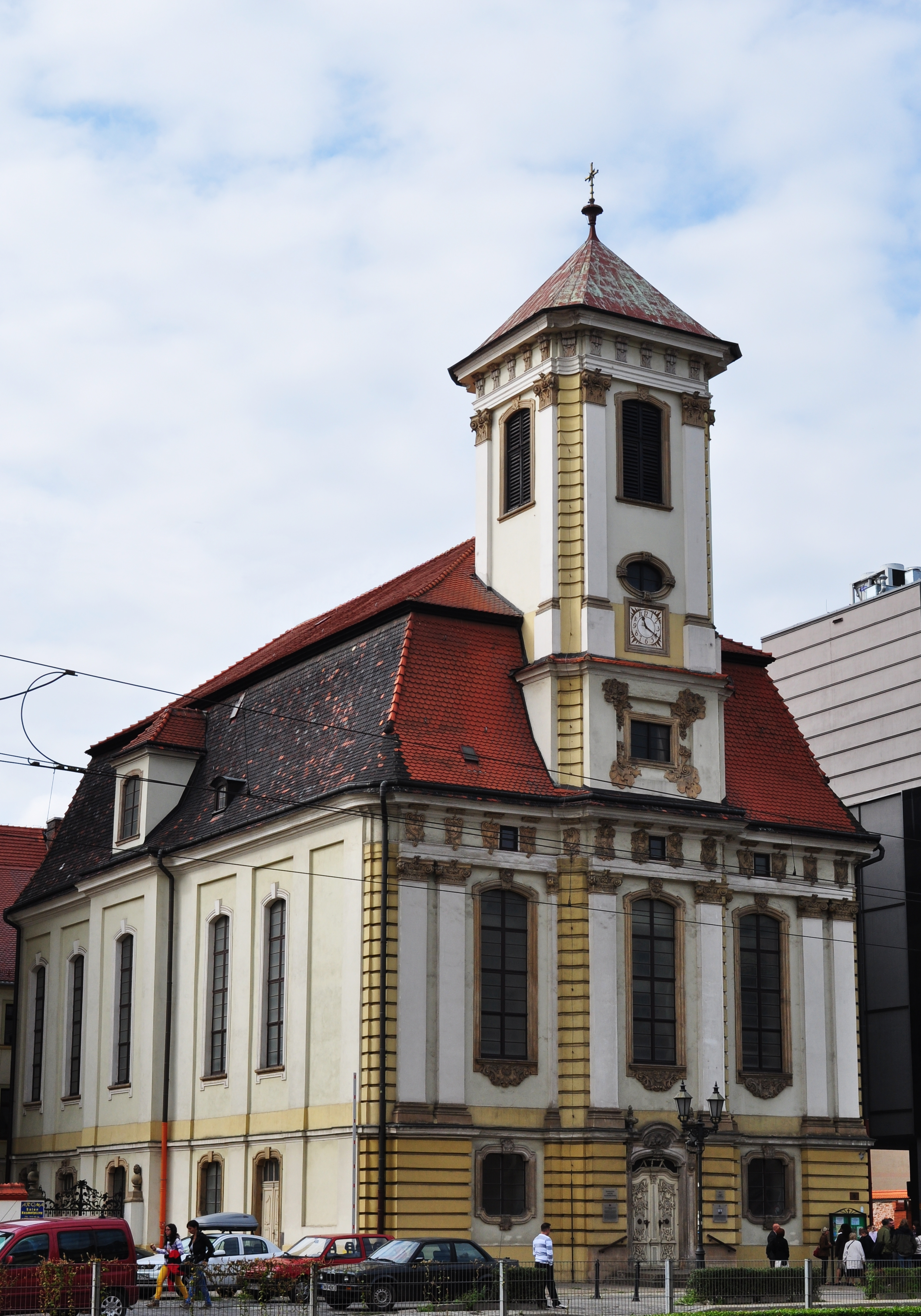 Kościół parafialny Opatrzności Bożej – zwany Dworskim (ewangelicki) Kazimierza Wielkiego 29, Miasto Wrocław - Stare Miasto